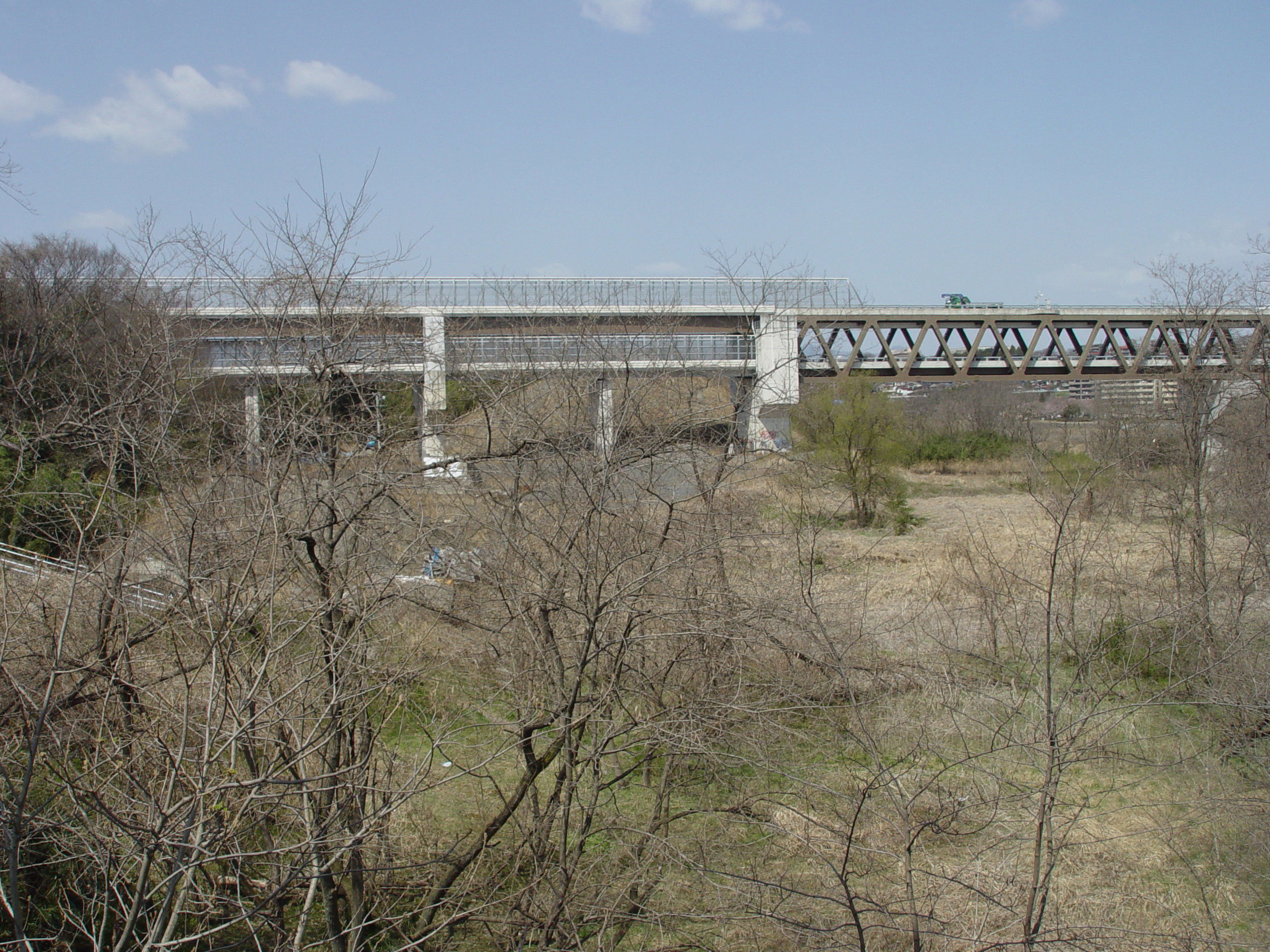 Ken-O Expressway over Tama River ja: 羽村市多摩川に架かる首都圏中央連絡自動車道の「多摩川橋」